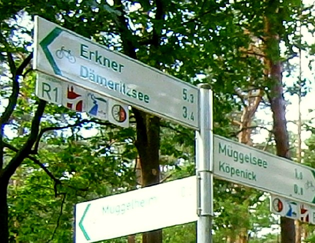 Markierung des Radwanderwegs R1 in Berlin-Müggelheim, an der Kreuzung mit dem Neu-Helgoländer Weg.